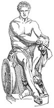 Бог войны